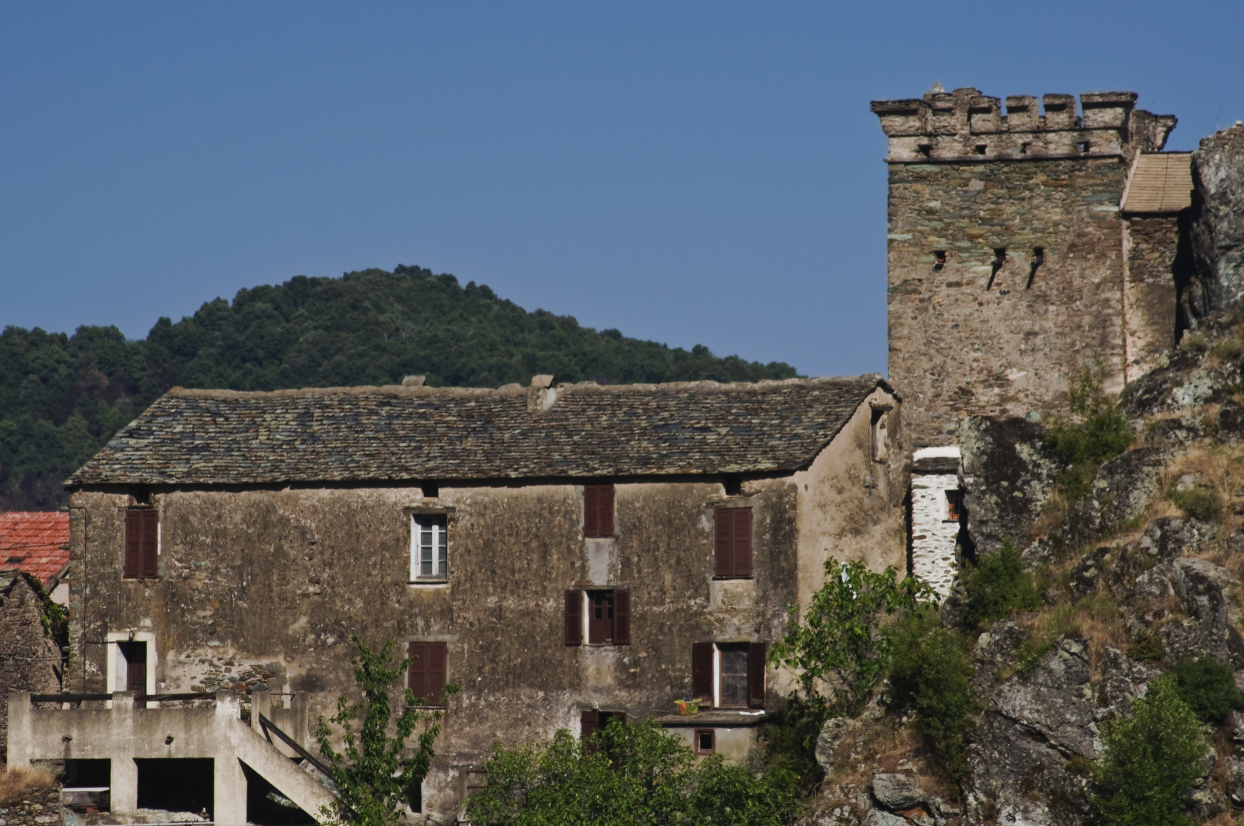 maison de la famille Matra à Aléria, Corse, France.